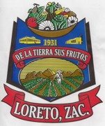 Stemma Loreto Zacatecas